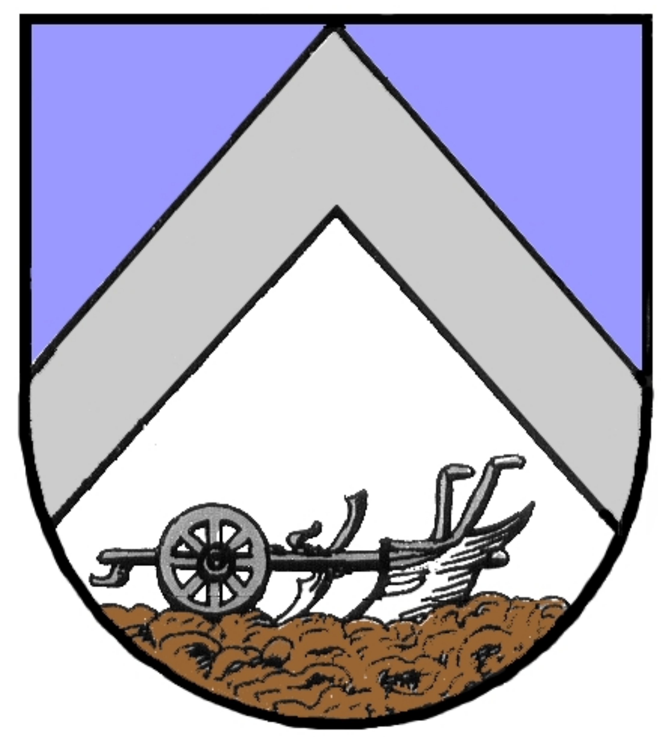 Wappen des Ortes Boitzum